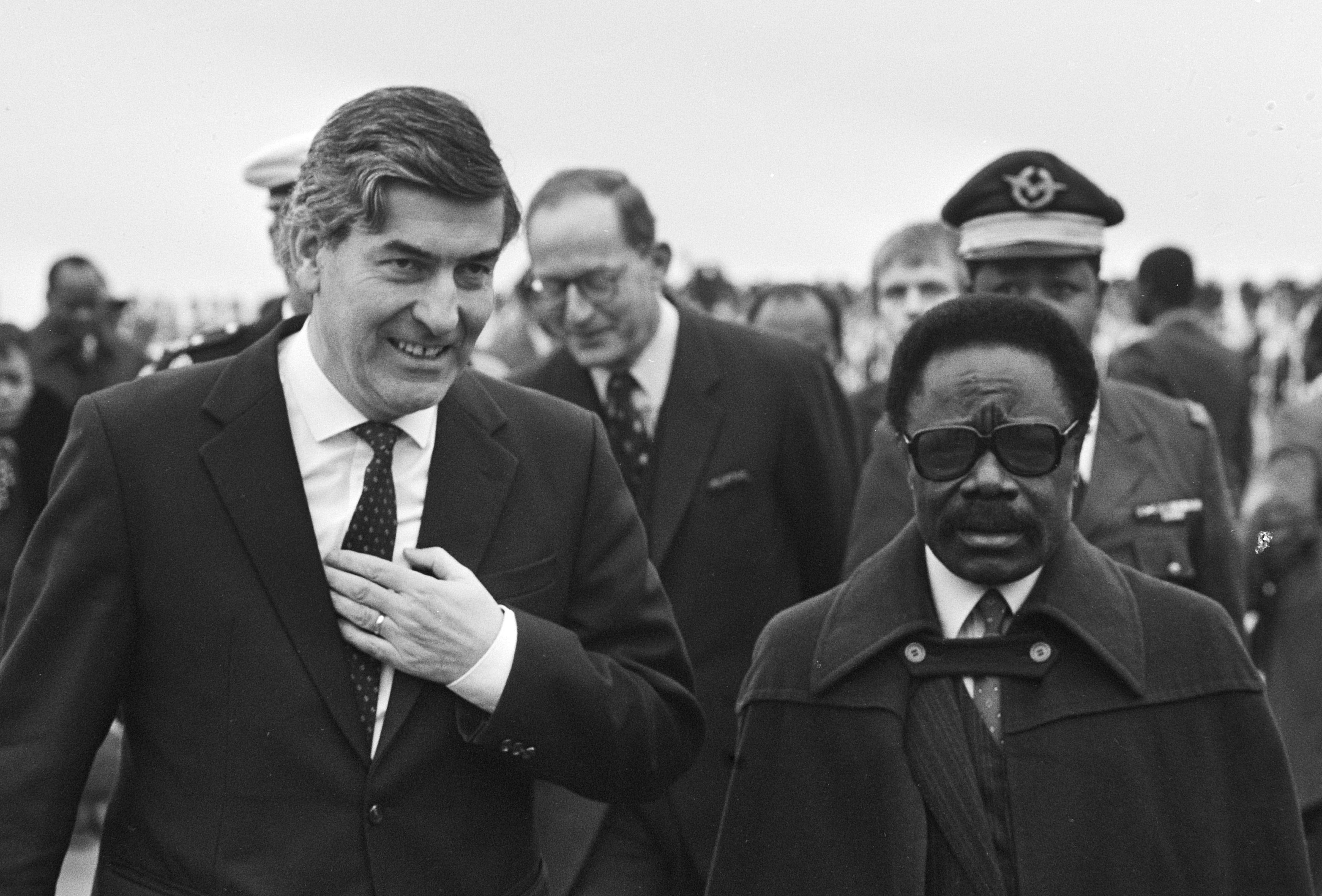 Staatsbezoek president Bongo van Gabon; president Bongo en premier Lubbers